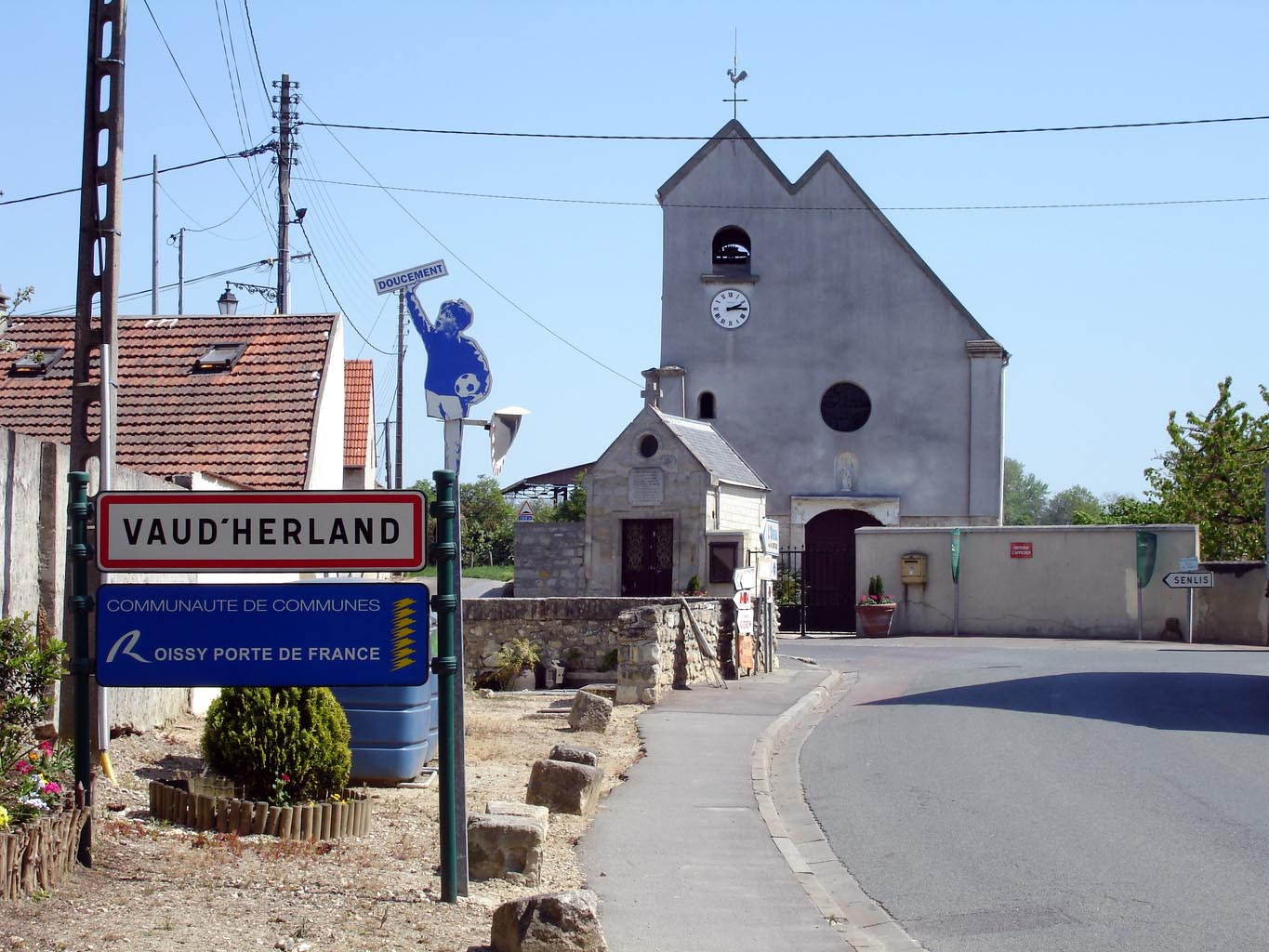 Entrée ouest du village de Vaudherland (Val-d'Oise), France